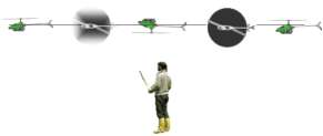 RC-Modellhubschrauber Flugmanöver "Rolle"